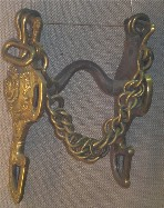 Mors_ancien.jpg exposé au Musée vivant du cheval, Chantilly